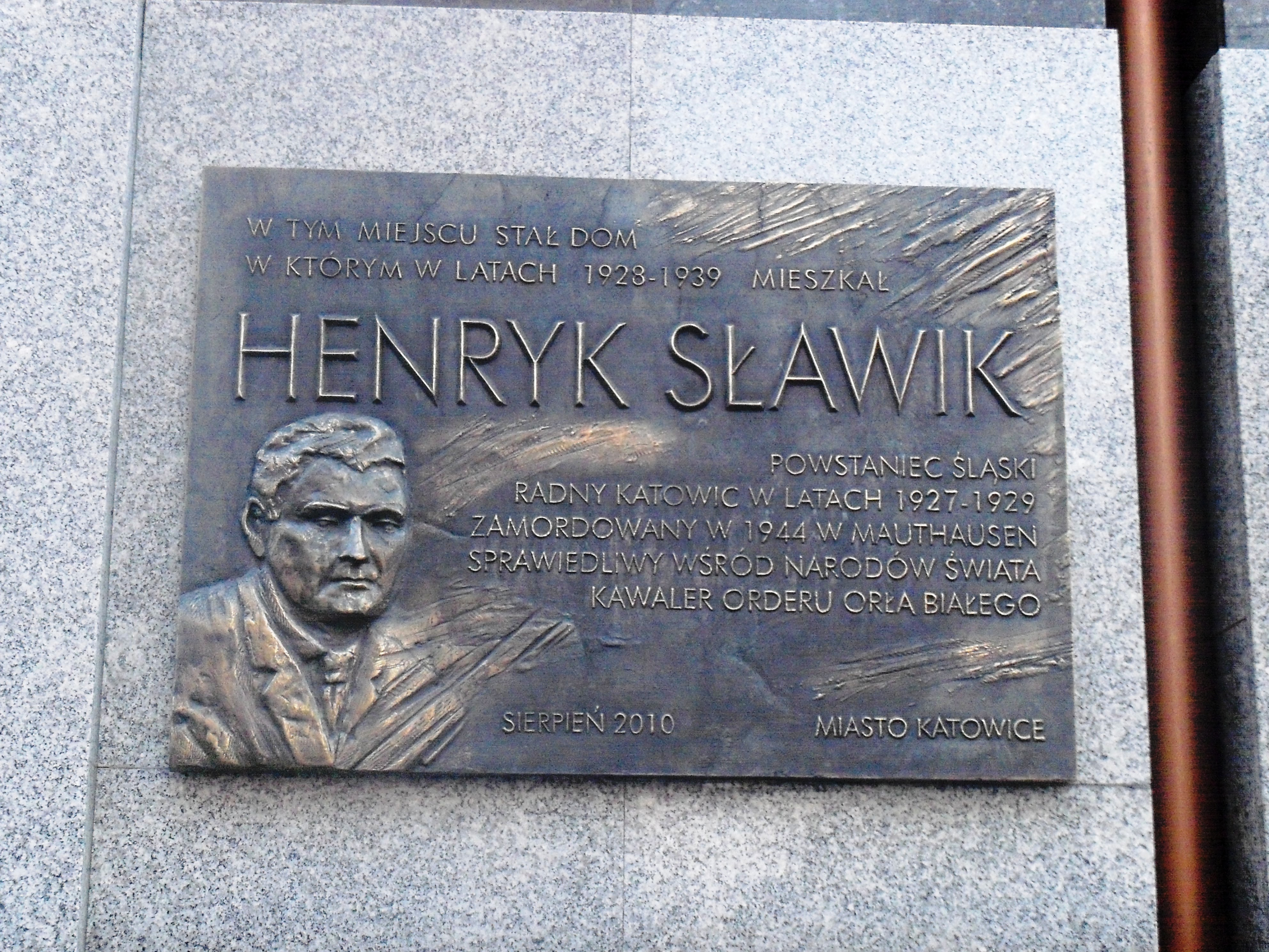 Tablica pamiątkowa, poświęcona Henrykowi Sławikowi, znajdująca się na fasadzie budynku przy ul. Świętego Jana w Katowicach